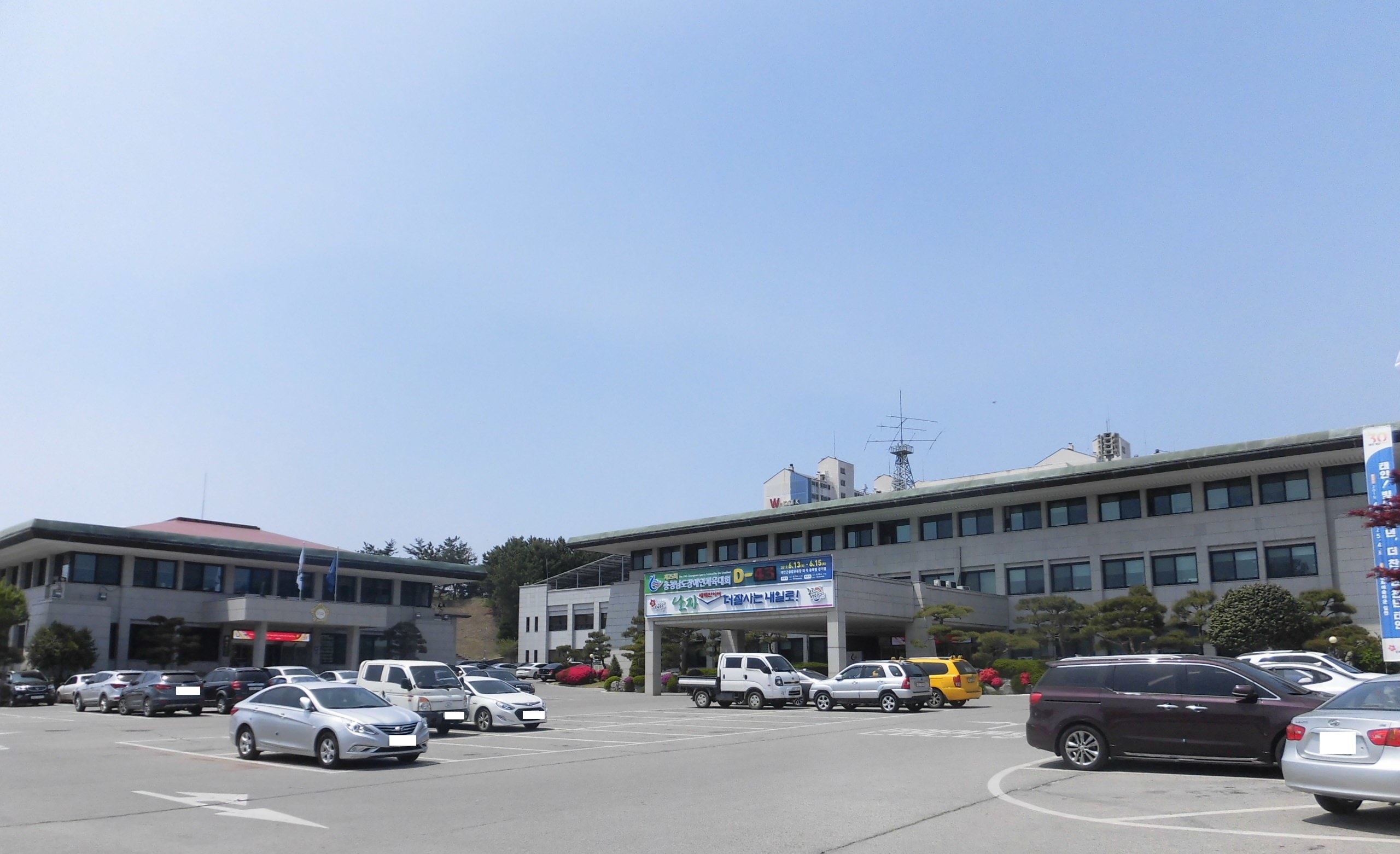 충청남도 태안군에 있는 태안군청